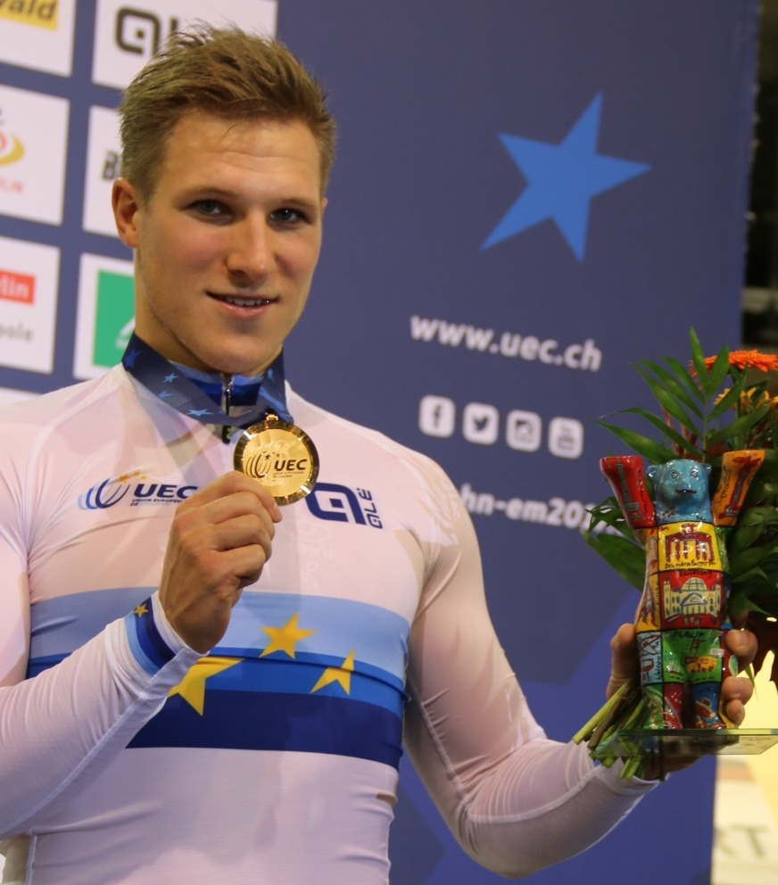 Jeffrey Hoogland, niederländischer Radsport - Europameister im Zeitfahren